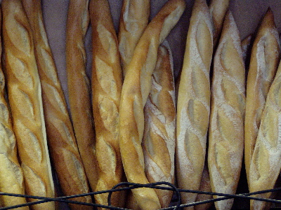 Bagety